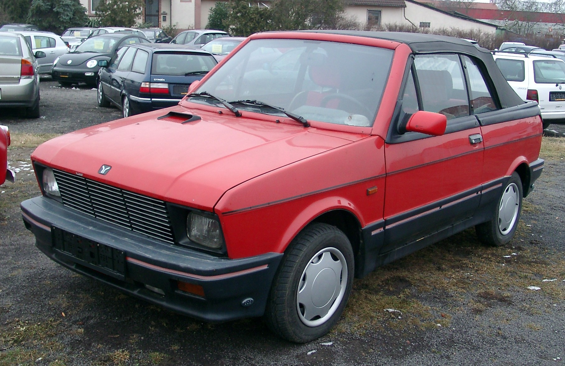 Yugo Cabrio 65 EFI